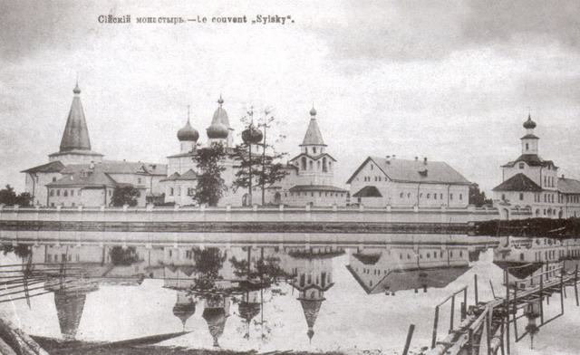 Сийский монастырь, дореволюционная открытка